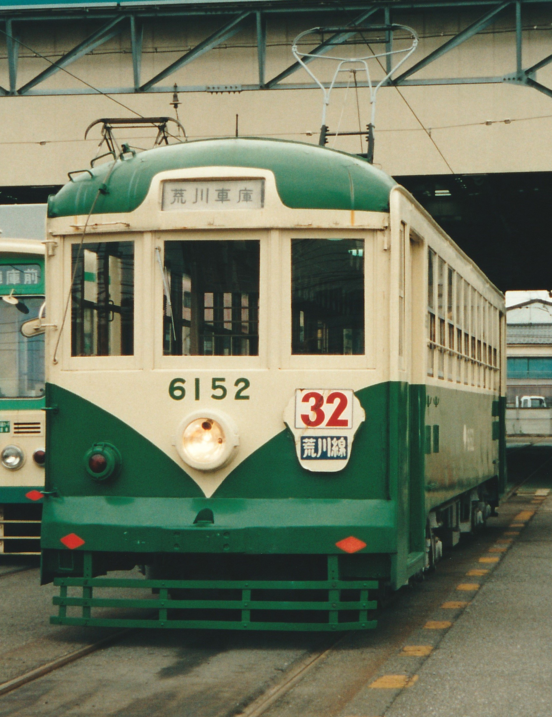 東京都交通局6000形6152号（一球さん）。荒川車庫にて撮影